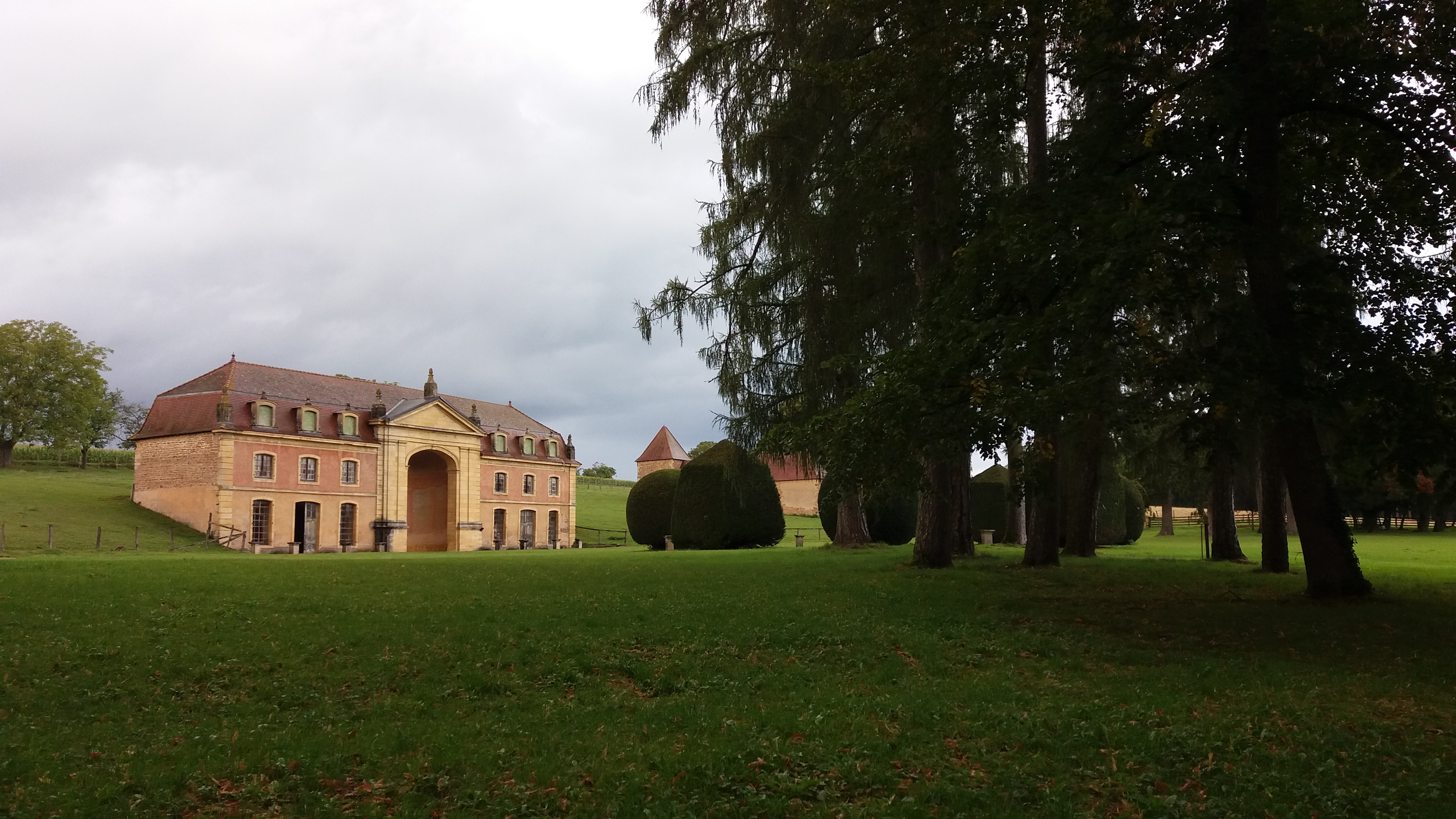 Orangerie.